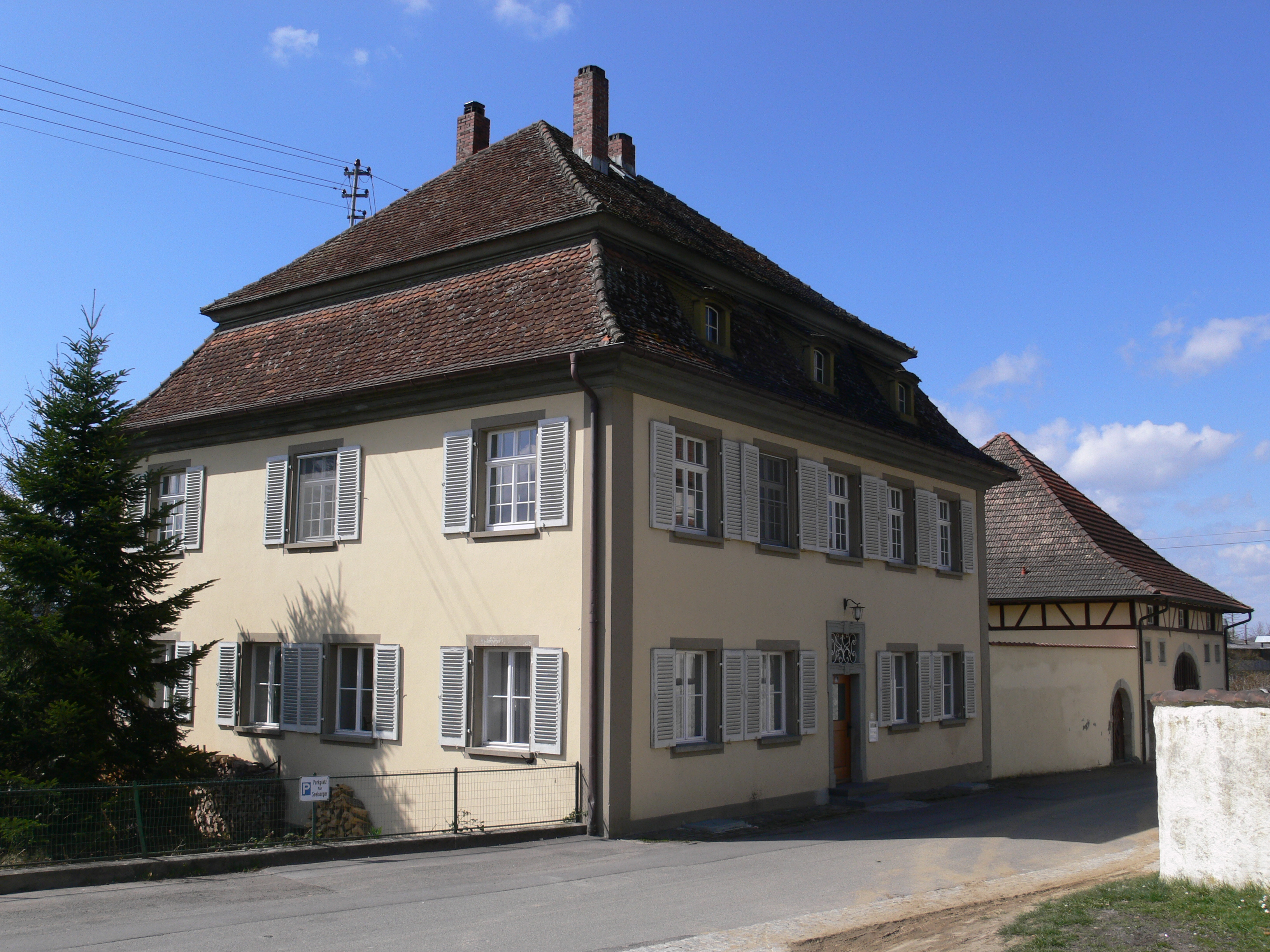 Pfarrhaus der Pfarrei St. Georg, Bermatingen